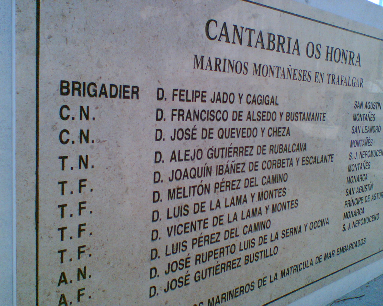 Monumento dedicado a la memoria de los Marinos Montañeses Ilustres que participaron en la Batalla de Trafalgar situado en Santander (España).